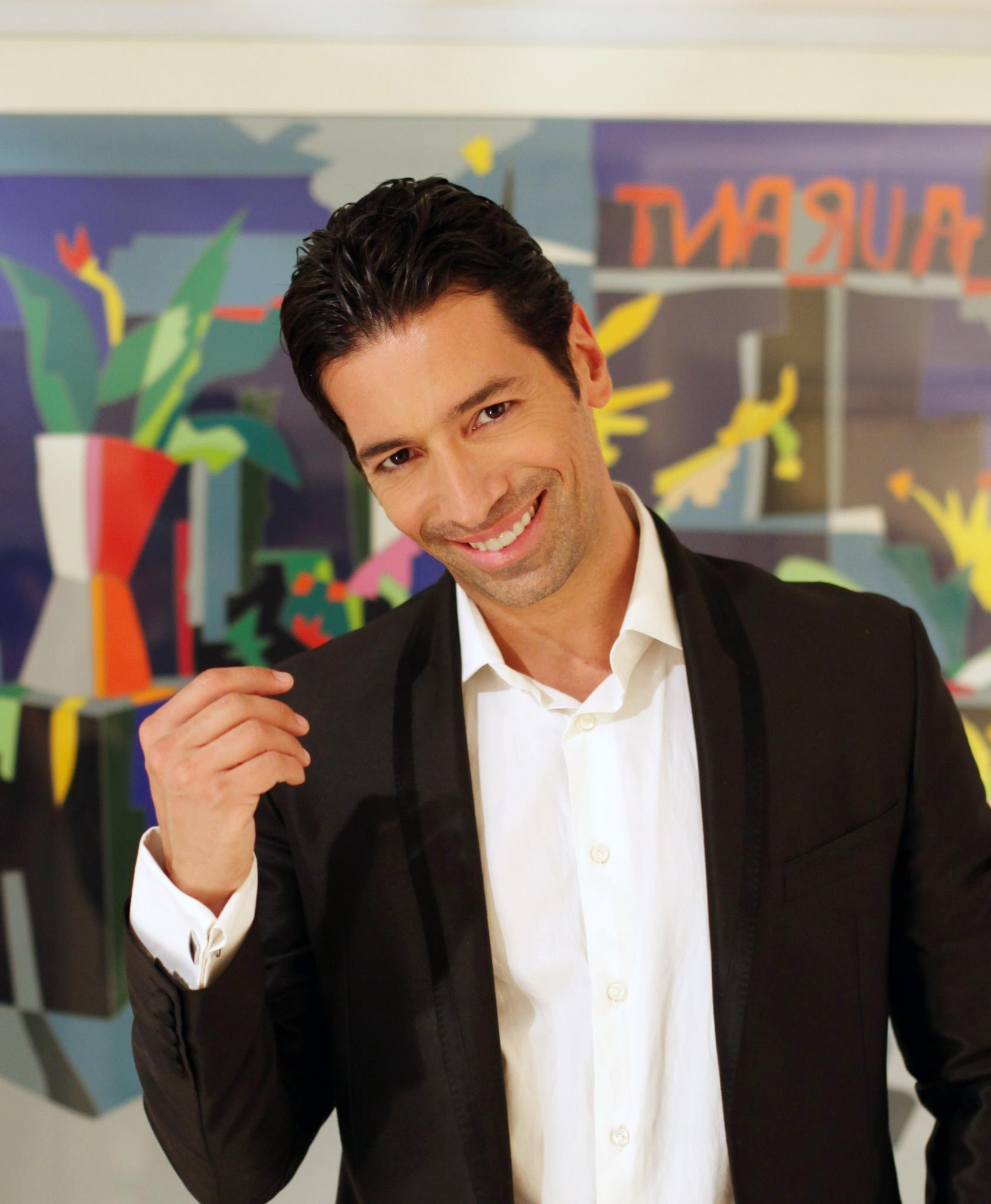 l'attore Michel Altieri